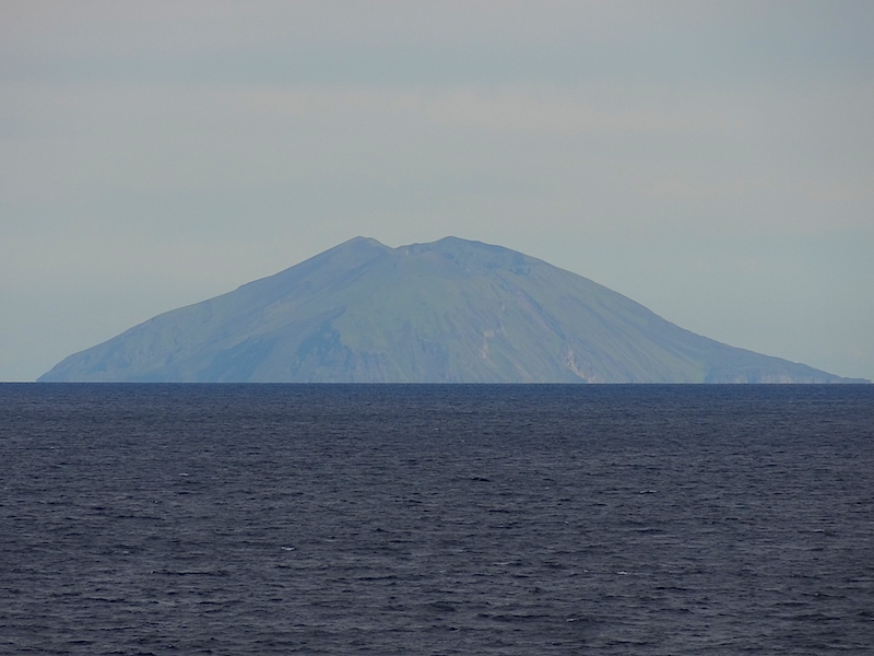 渡島大島（新日本海フェリーから撮影）